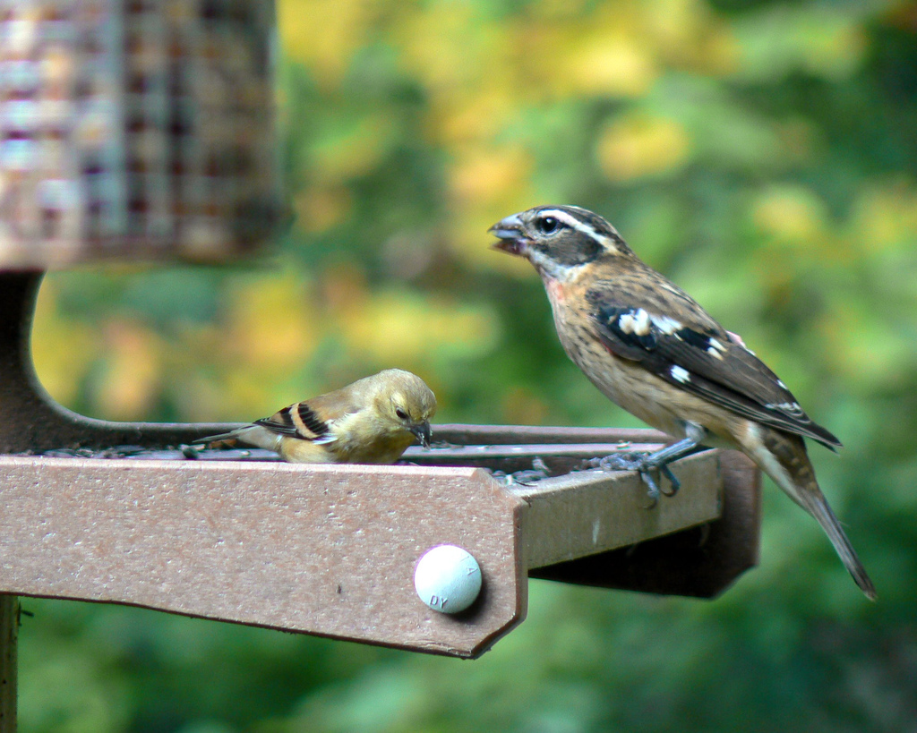 cardinal à poitrine rose Pheucticus ludovicianus, mâle immature